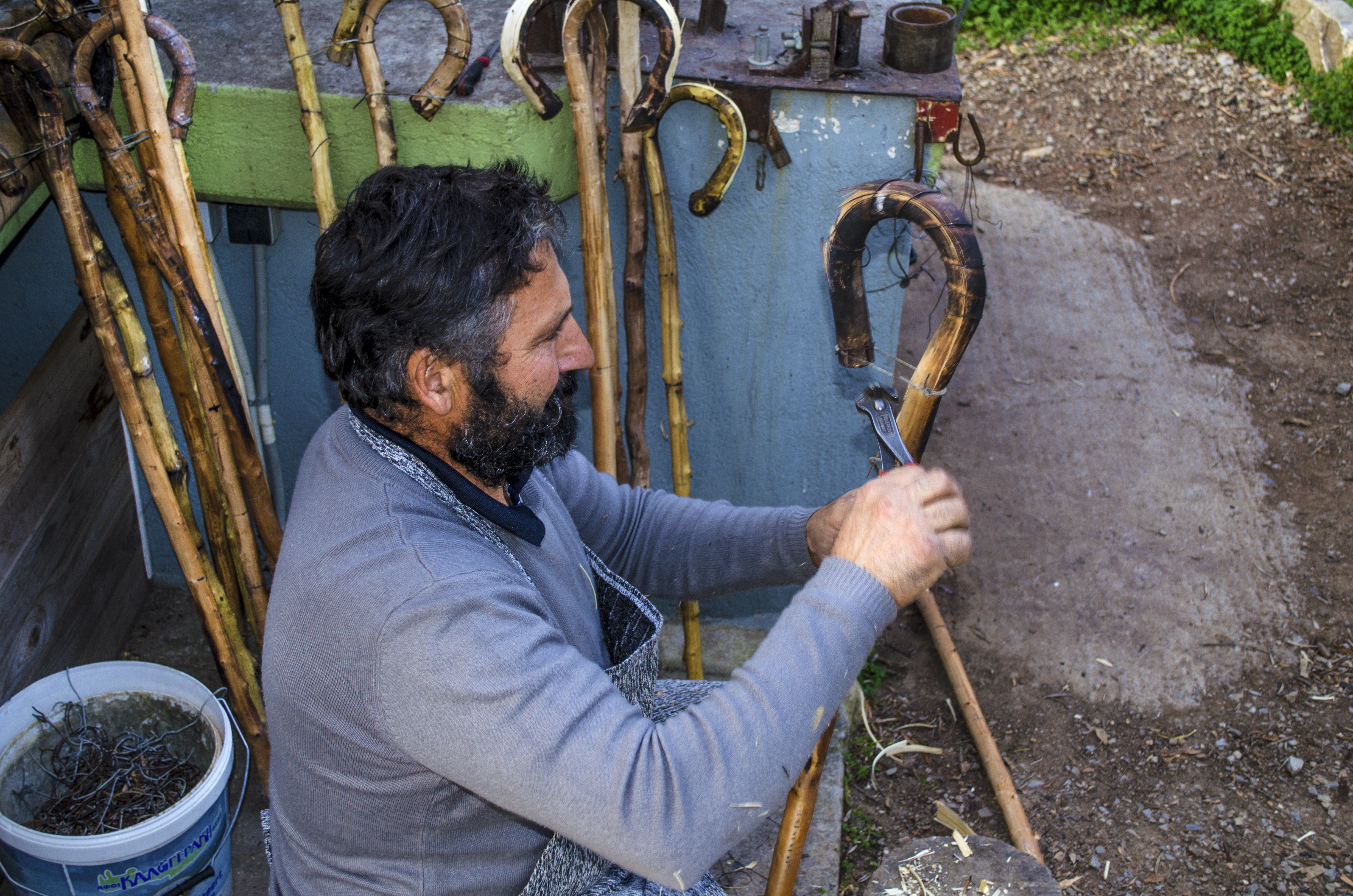 Κατασκευή κρητικής κατσούνας